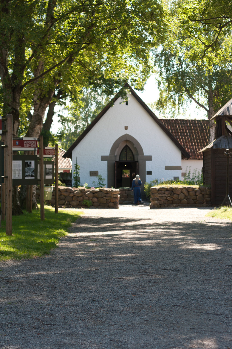 Olavskapellet på Borgarsyssel Museum. Foto: Espen Nordenhaug